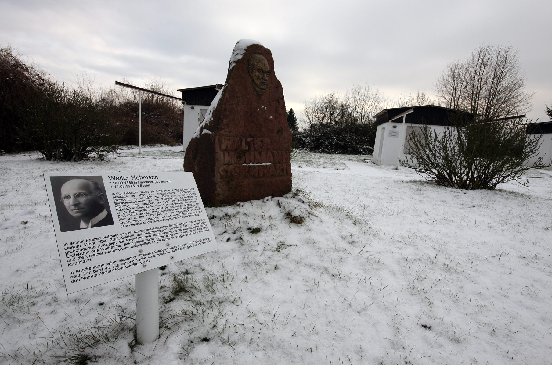 Walter-Hohmann Gedenktafel an der Walter-Hohmann-Sternwarte, Essen, Deutschland